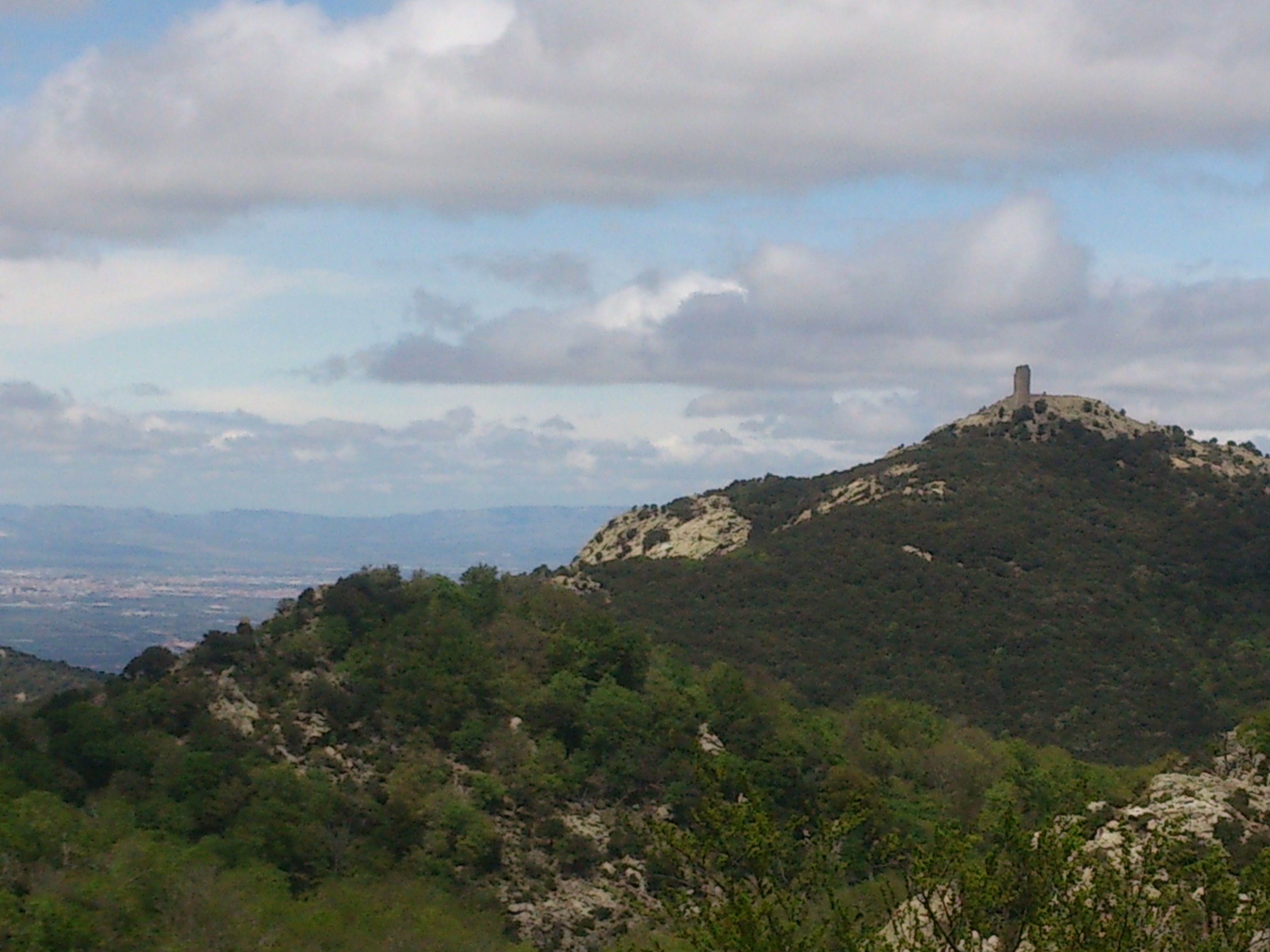 Fofo que mostra la continuitat forestal de la Reserva N.F.